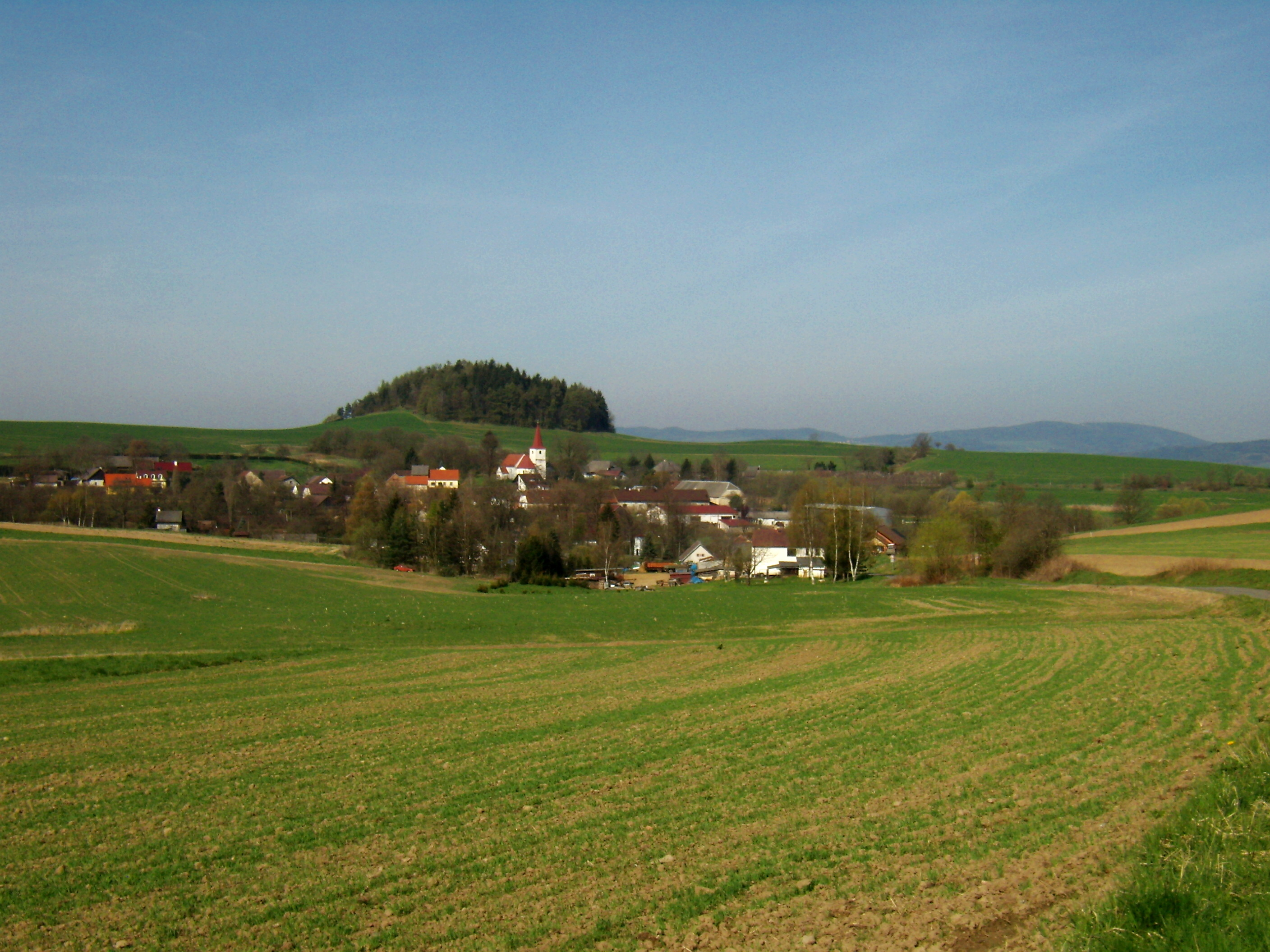 Kydliny